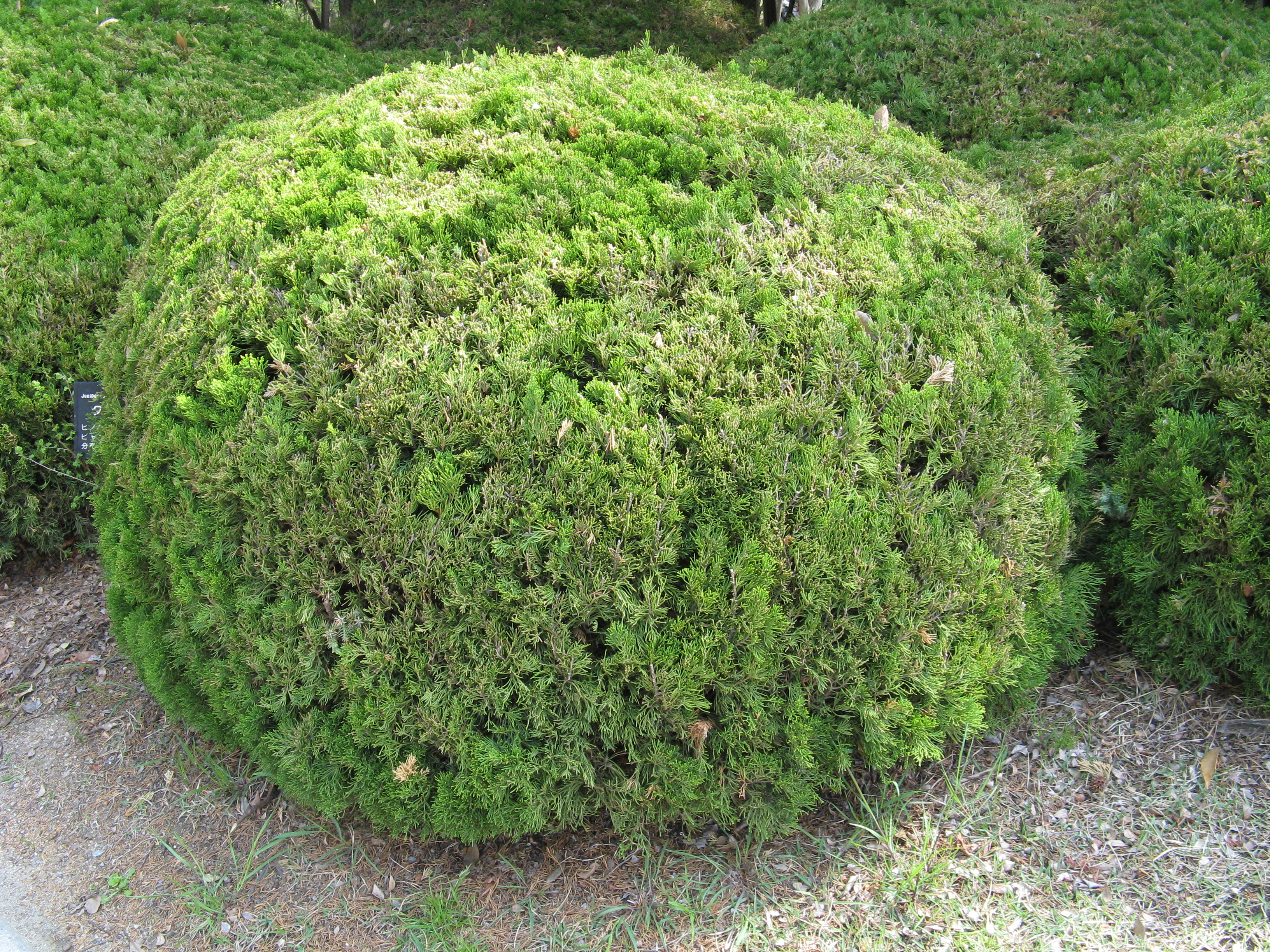 Juniperus chinensis 'Globosa'